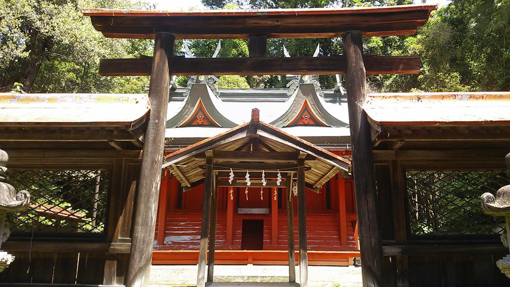 村屋坐弥冨都比売神社本殿